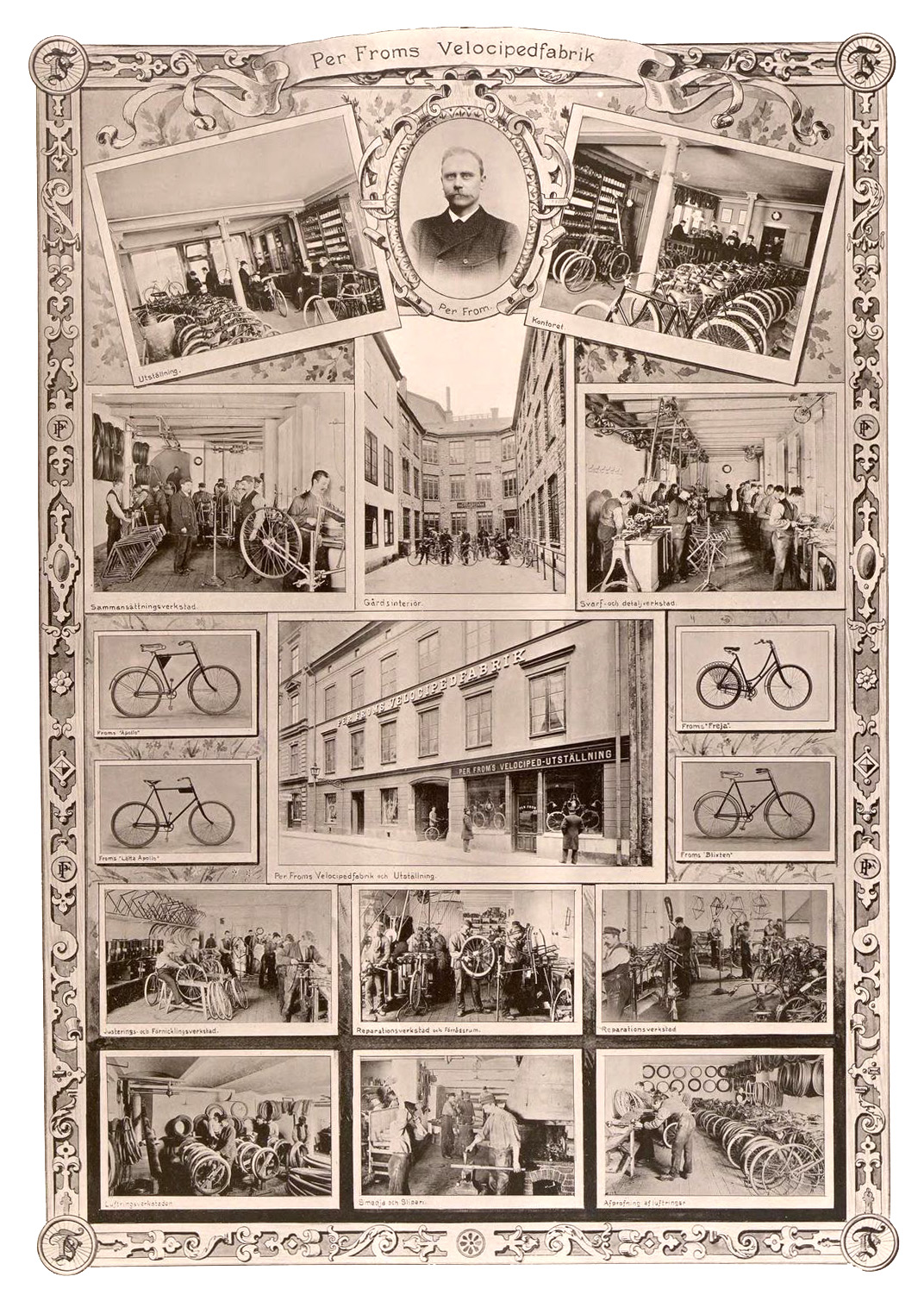 Per Froms Velocipedfabrik